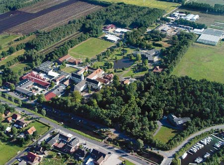 HP der Jugendhilfe Johannesburg im Jahr 2009 (Standort)